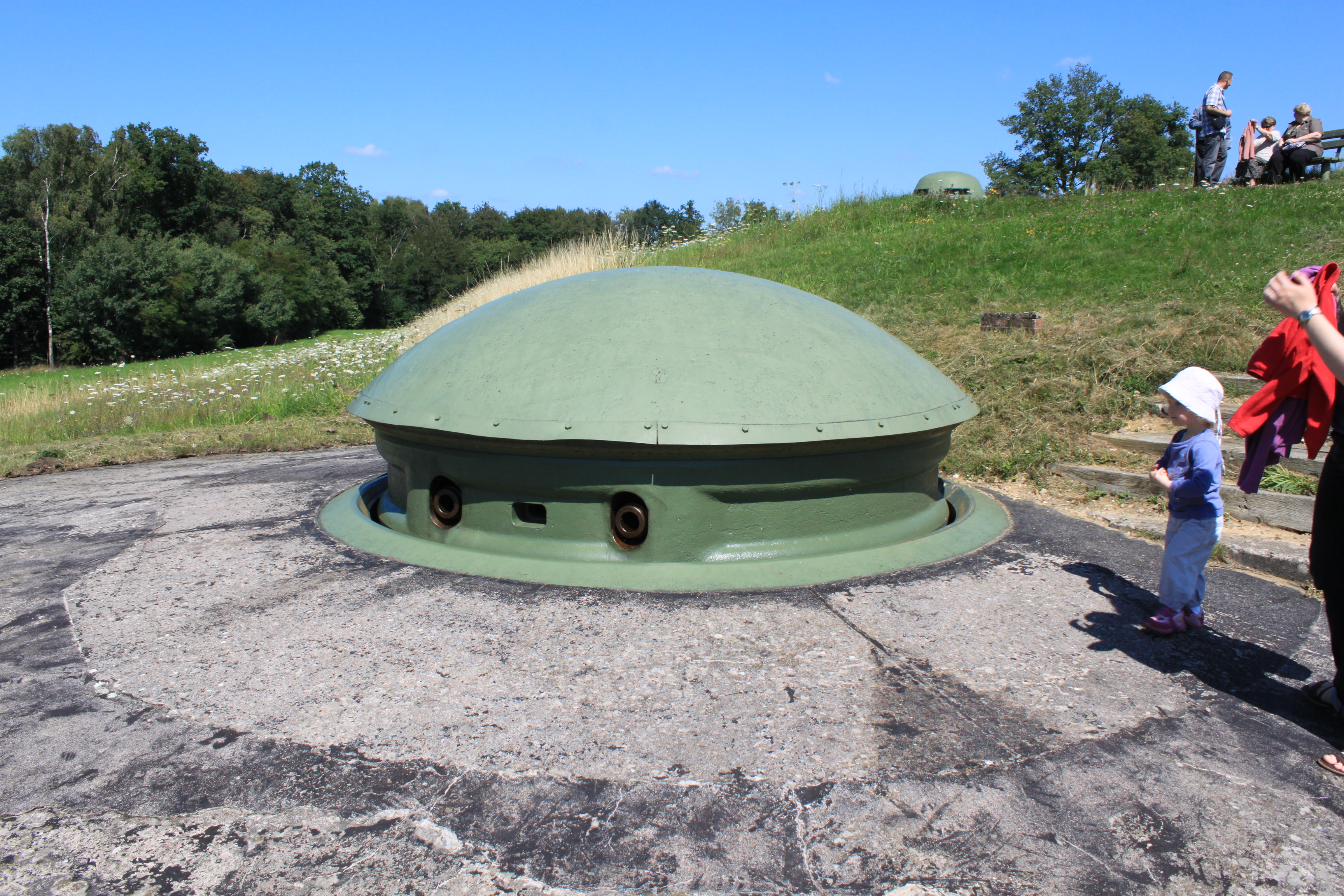 Fort d'Uxegney, Vosges, Lorraine, France